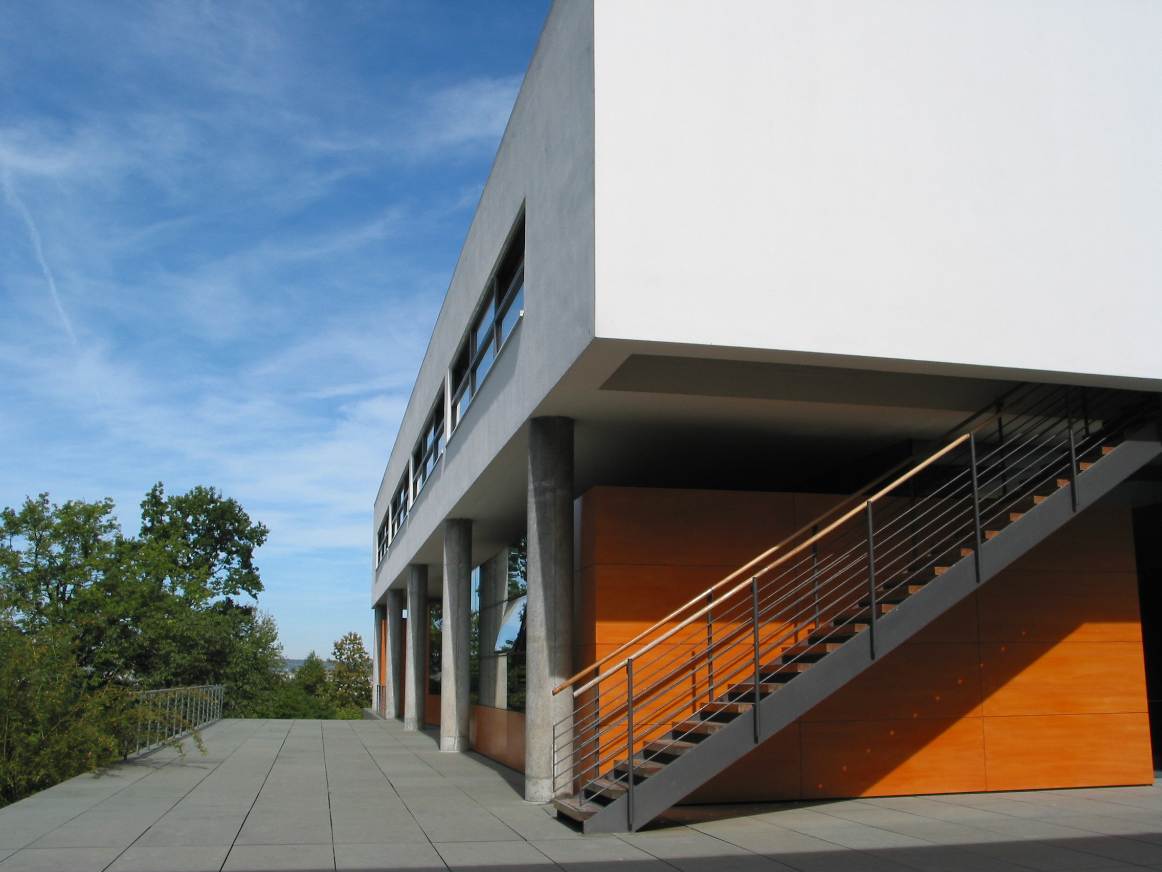 Blick nach Norden über die Terrasse des "Musikgymnasiums Schloss Belvedere" bei Weimar. Rechts die Außentreppe zum Obergschoss.